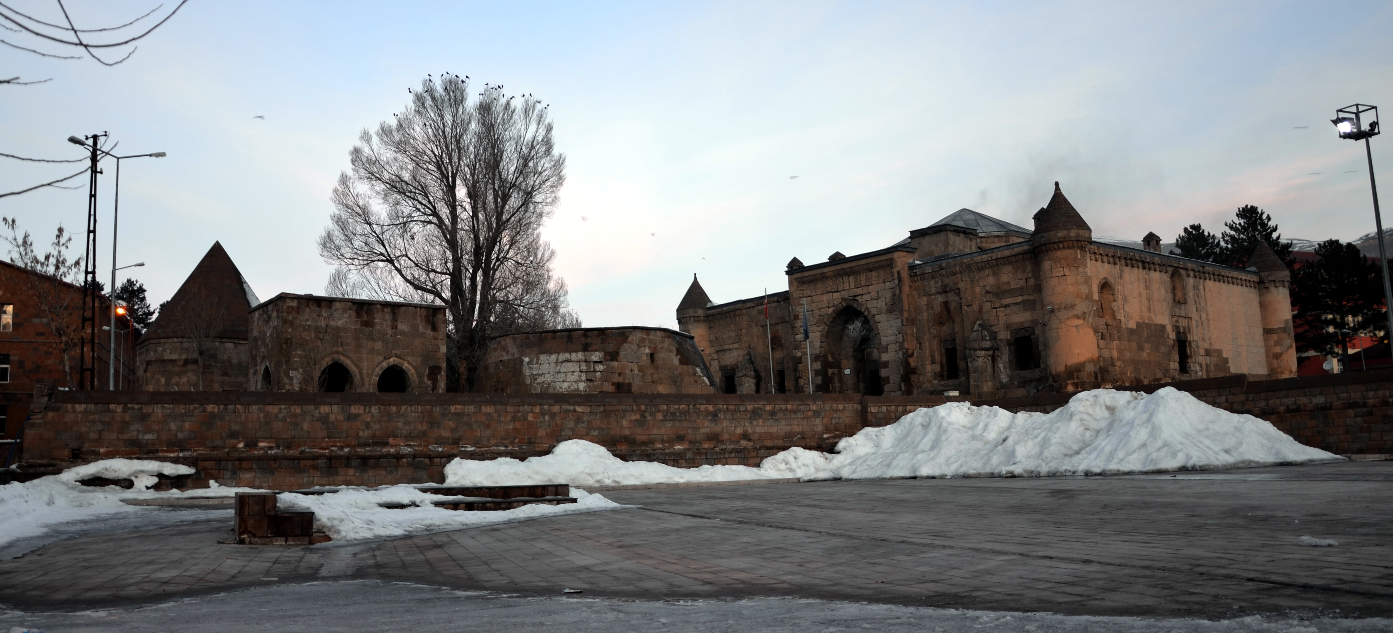 İhlasiye Medresesi, Bitlis Merkez.